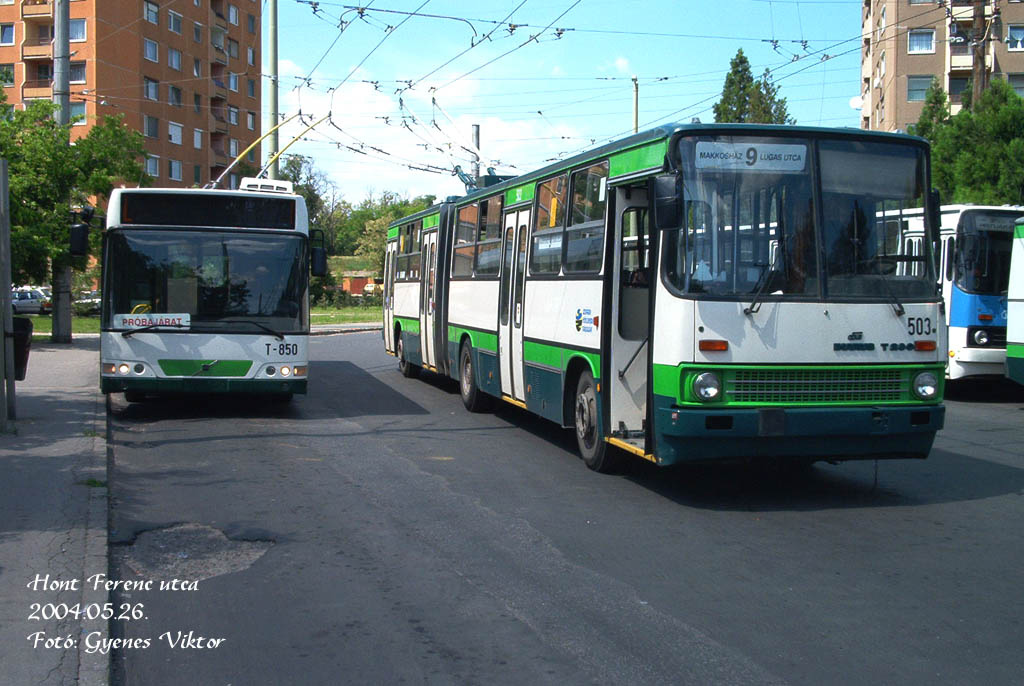 Az 503-as pályaszámú Ikarus 280-as trolibusz Szegeden.